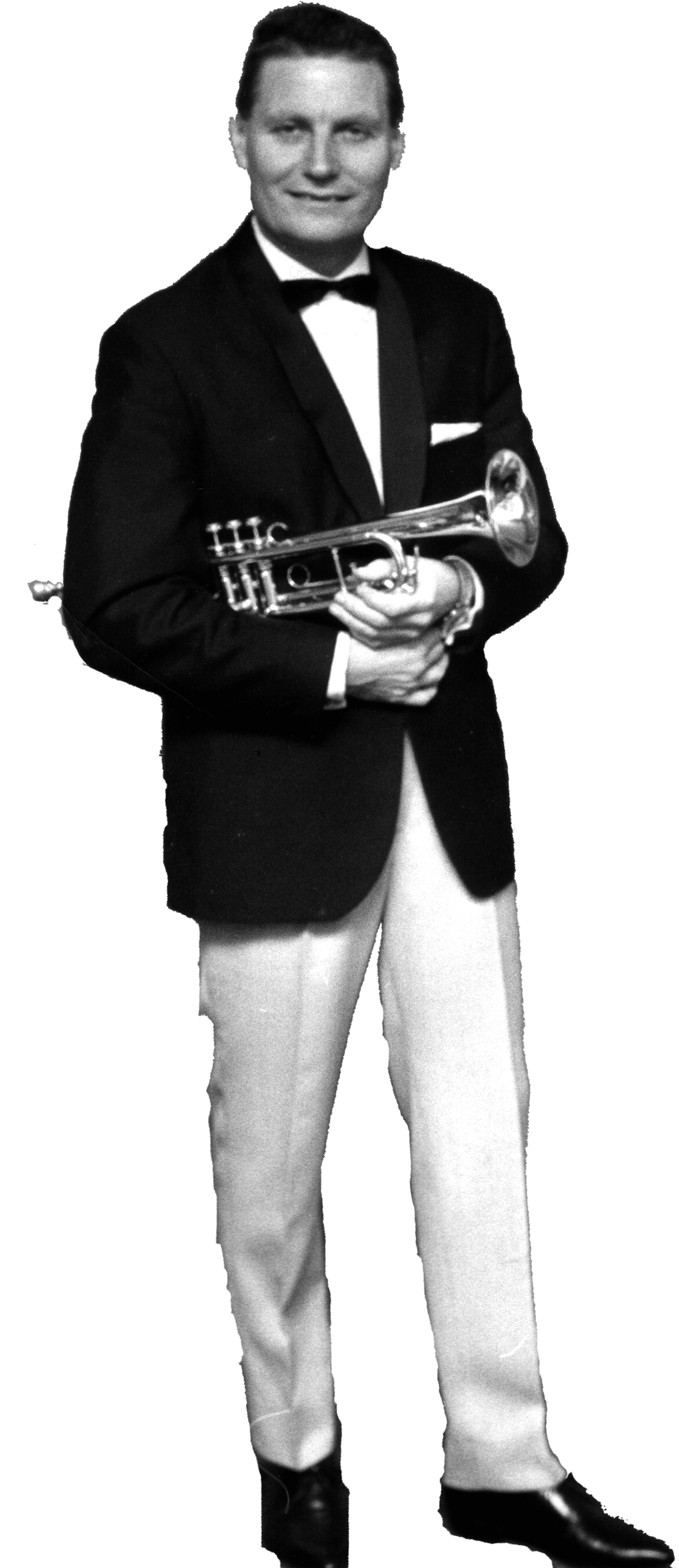 Bildet er tatt i forbindelse med plakat